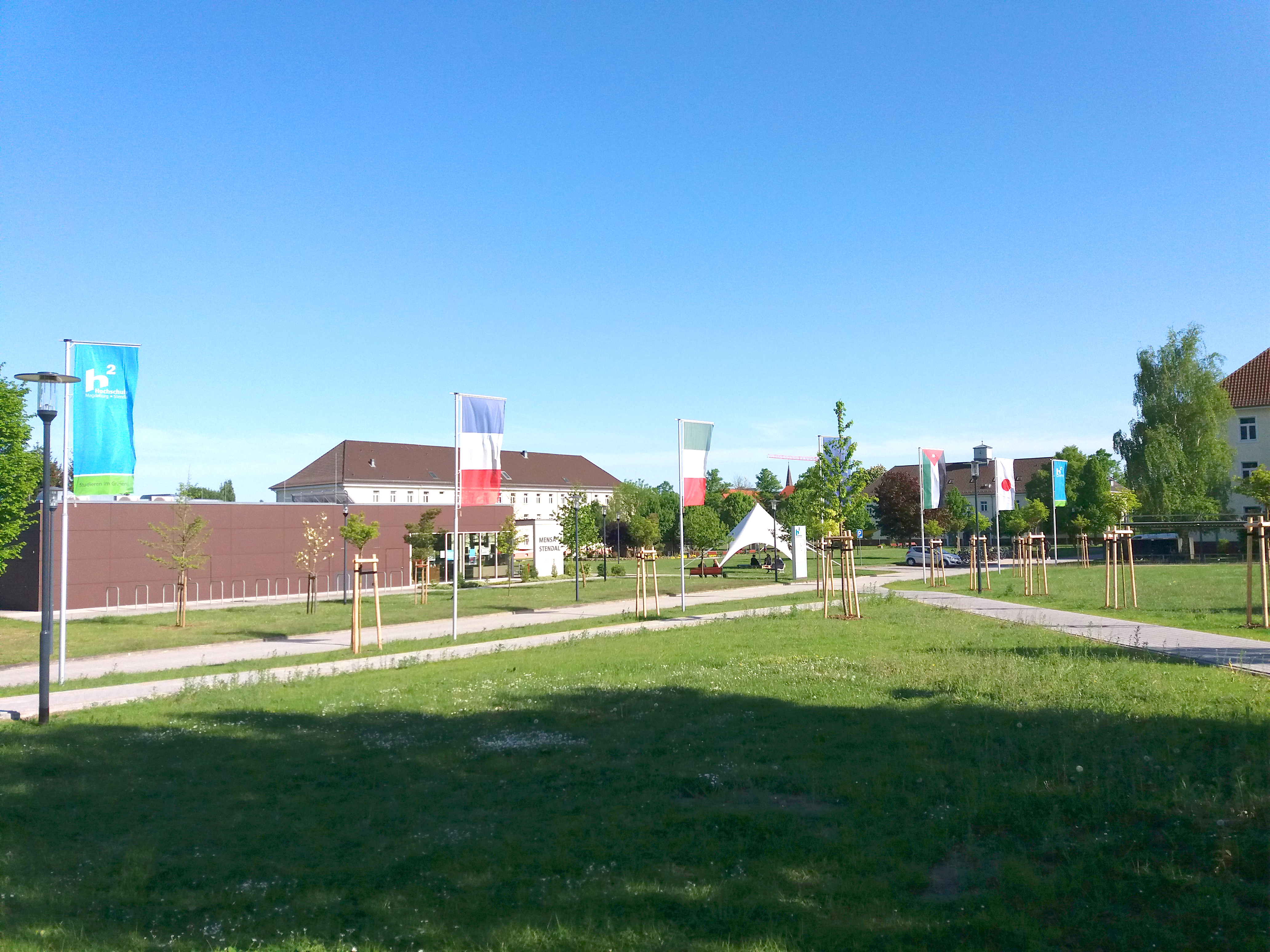 Teil des Hochschulcampus in Stendal.